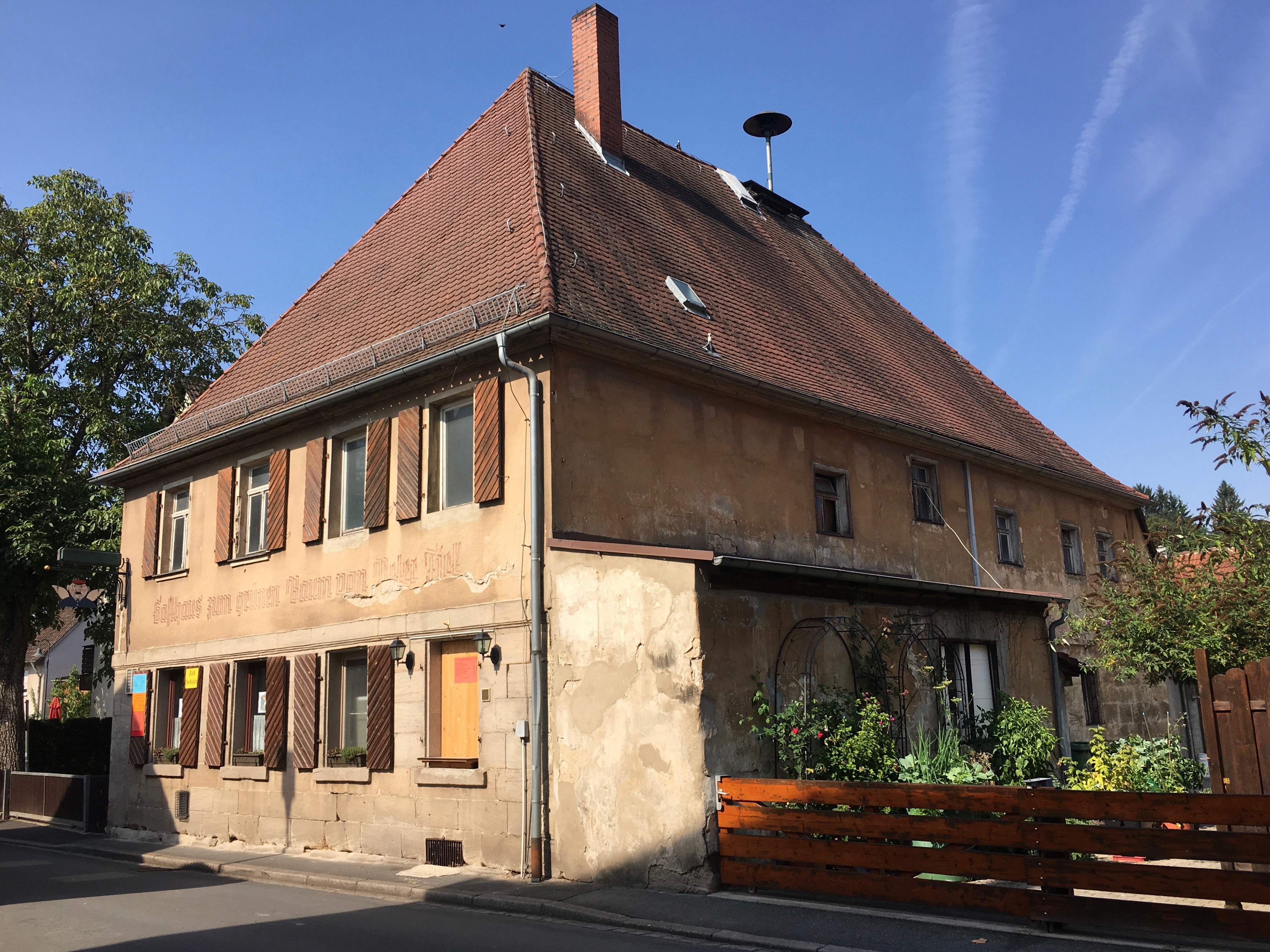 Kleinseebach-Dorfstraße 1